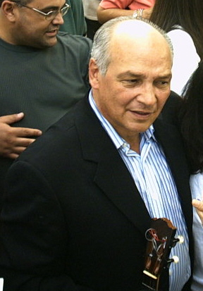 Hernán Gamboa